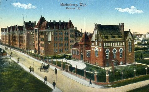 Pocztówka z początku XX w. przedstawiająca koszary 152 pułku piechoty w Malborku